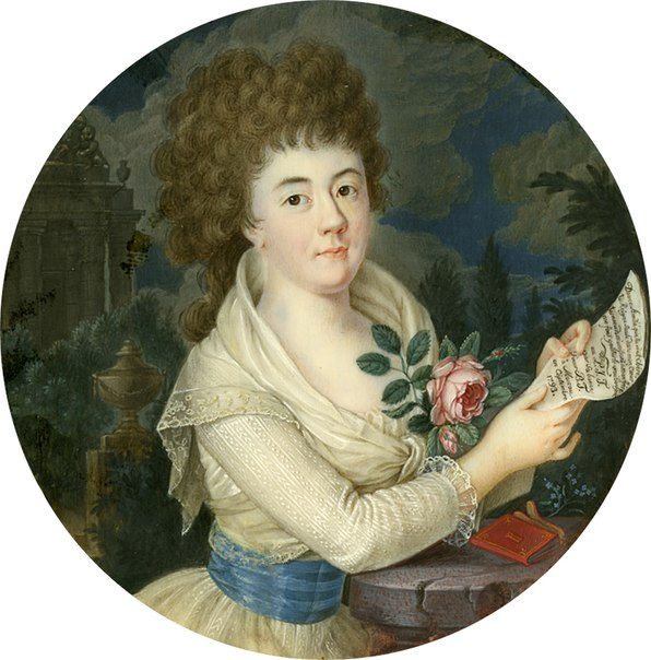 Княжна Варвара Николаевна Трубецкая (1766—1813), с 1797 года замужем за А. М. Мухановым.